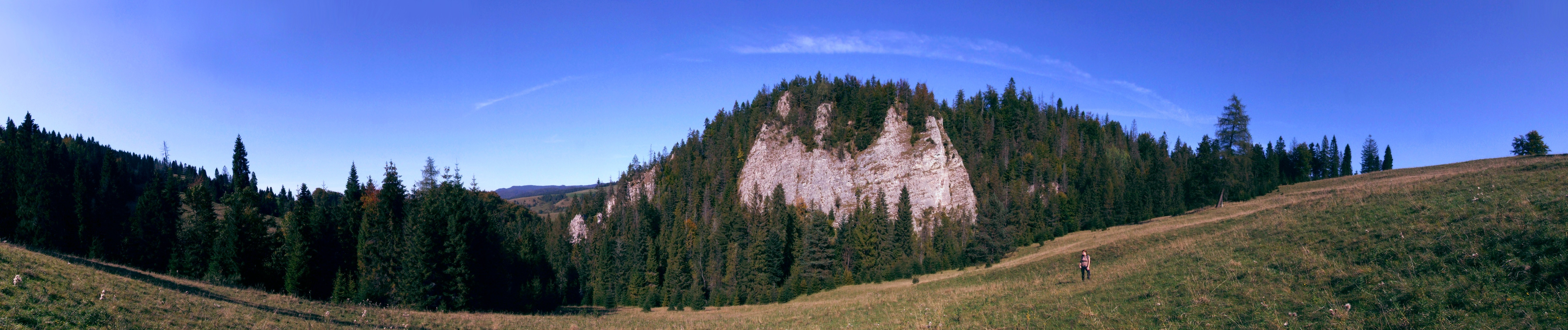 Brysztańskie Skały w Małych Pieninach. Widok od południowej strony